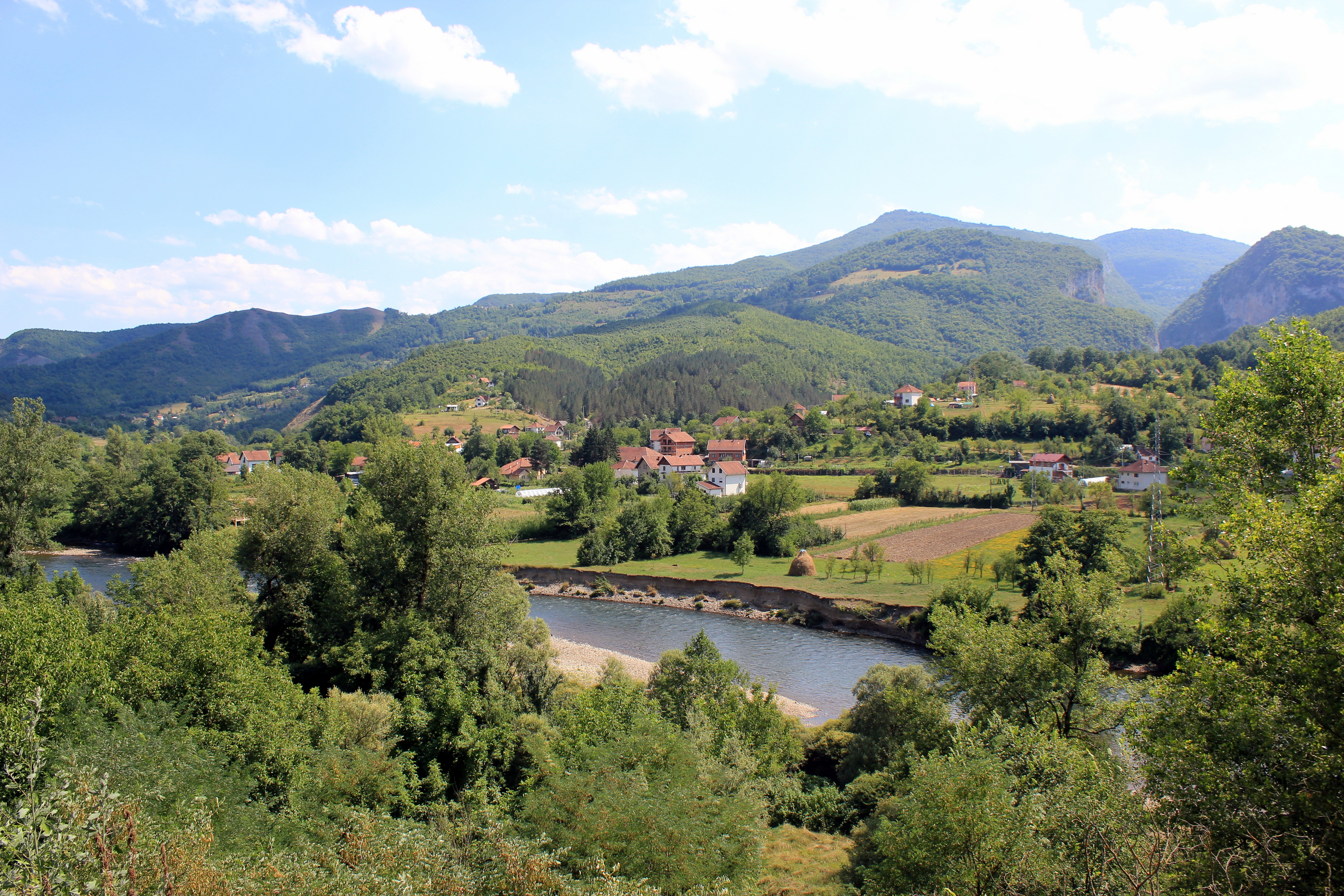 Der Lim bei Sjeverin, rechts Serbien, links Bosnien und Herzegowina.